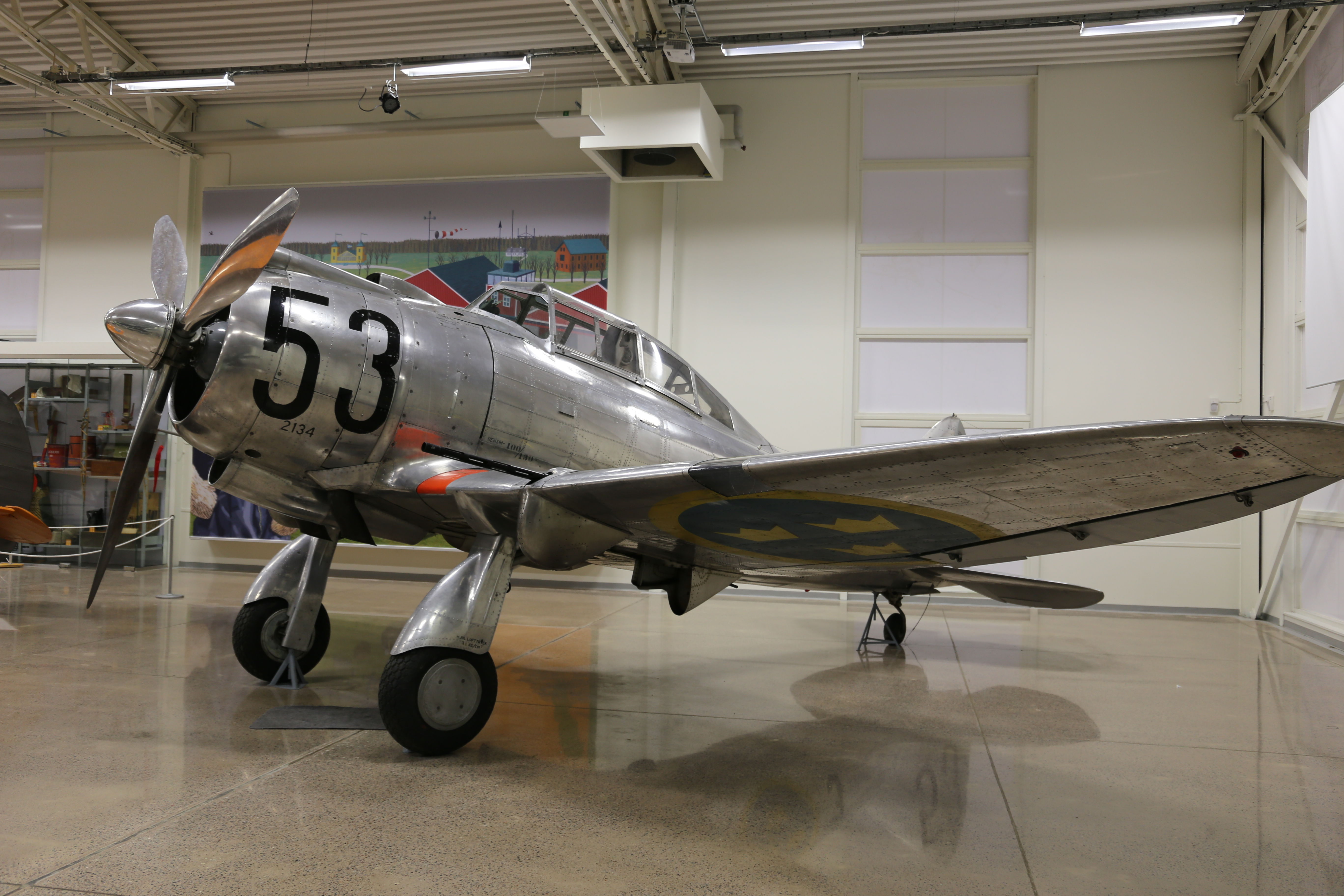 Seversky P-35 J 9 at Swedish Air Force Museum